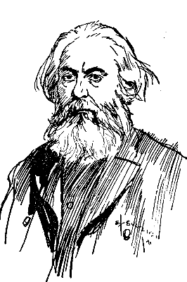 William Huggins - Project Gutenberg eText 14990